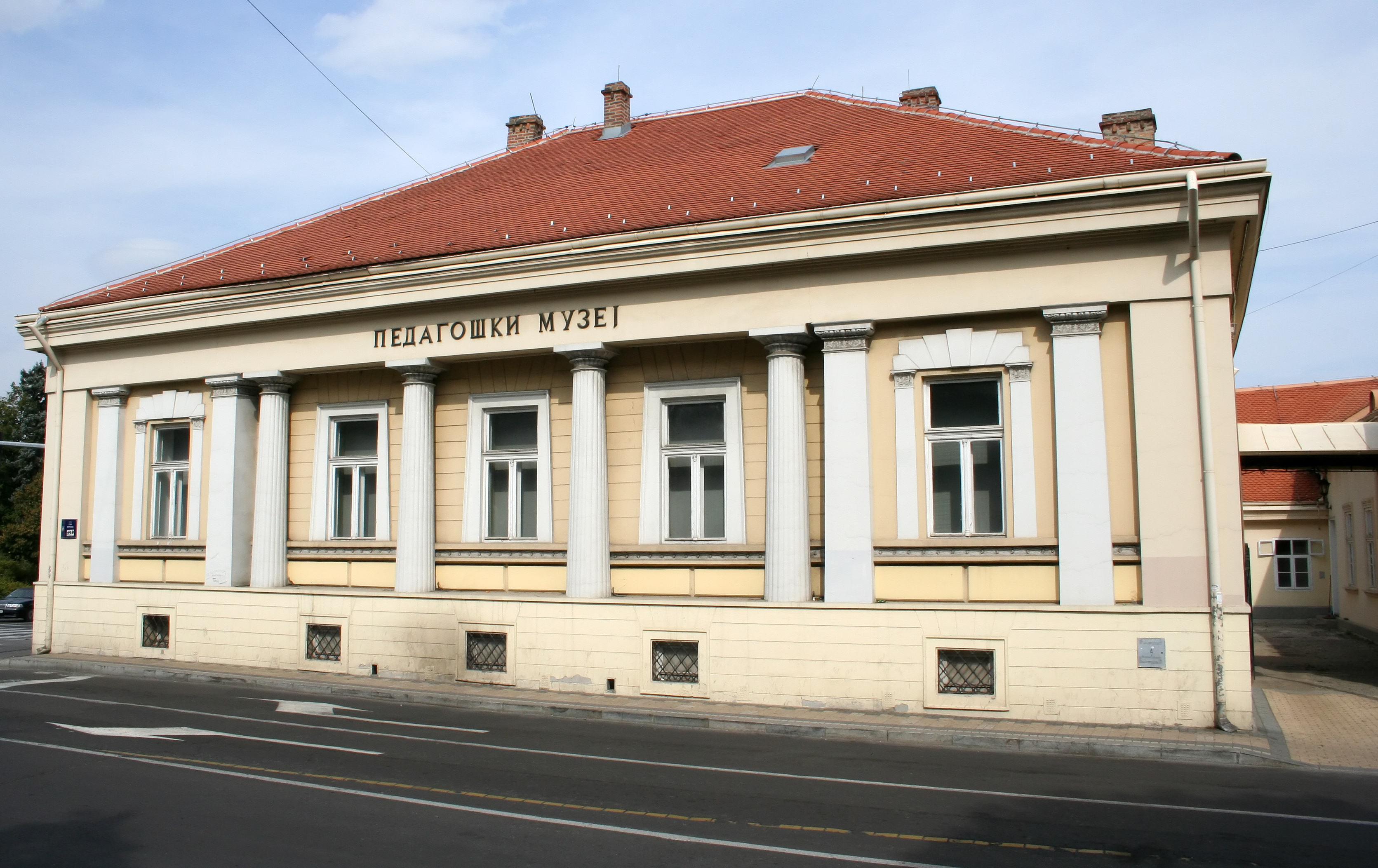 sada zgrada Pedagoškog muzeja